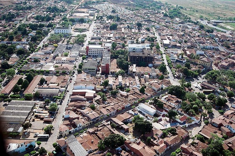 Esta imagem aérea da cidade de Barbalha também foi fotografada pelo cooperador.